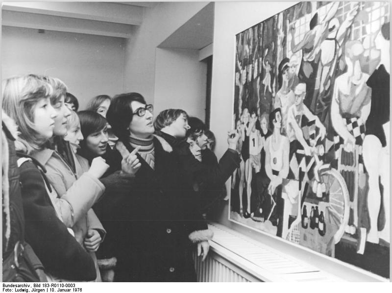 Eisenach, Jugendstunde auf der Wartburg ADN-ZB Ludwig-10.1.1976 Bez. Erfurt: Eine Jugendstunde auf der Wartburg erlebten diese Jugendlichen der Erich-Weinert-Oberschule in Berka (Kr. Eisenach) zusammen mit ihrer Lehrerin Renate Zitter (Mitte). Die Mädchen und Jungen, die in diesem Jahr Jugendweihe haben, besichtigten u. a. das Gemälde "Sportfest im Wohnbezirk" von Siegfried Besser, das auf der Wartburg in einer Sonderausstellung über den VEB Uhren- und Maschinenkombinat Ruhla zu sehen ist. - 1975 fanden auf der im 11. Jahrhundert errichteten Wartburg 1095 Jugendstunden statt, bei denen erfahrene Mitarbeiter der Wartburg-Stiftung Gesprächspartner der Schüler waren.